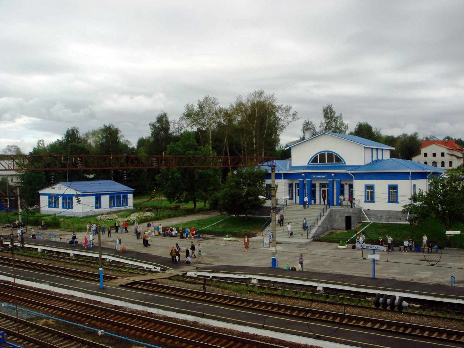 Вокзал станции «Ветлужская», Нижегородская область, Россия.